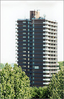 Torenflat De Blankaard